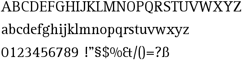 Schriftartenmuster der Rotis serif